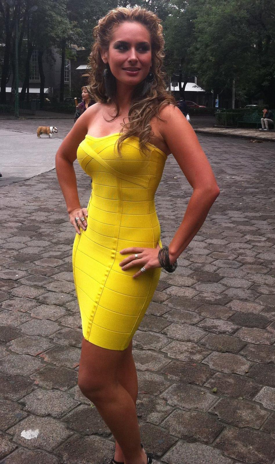 La actriz, Wendy Braga, captada en un Parque de la Ciudad de México.